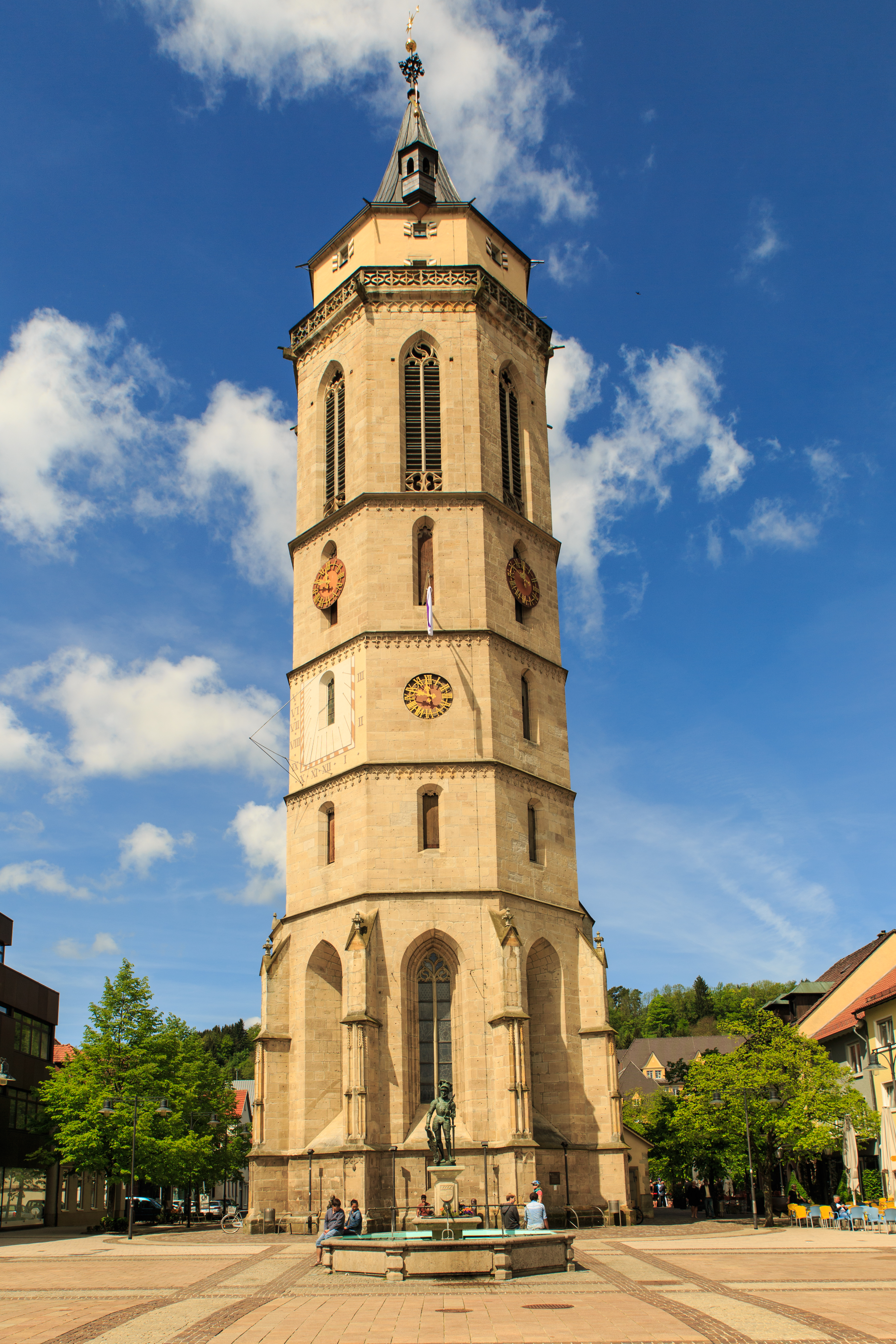 Chorturmanlage mit dreischiffigem, kapellengesäumten Langhaus, 1443–1512, Turmobergeschoss 1541